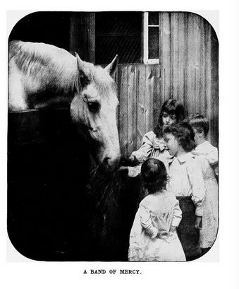 quatre enfants de Band of mercy donnent de la paille à manger à un cheval